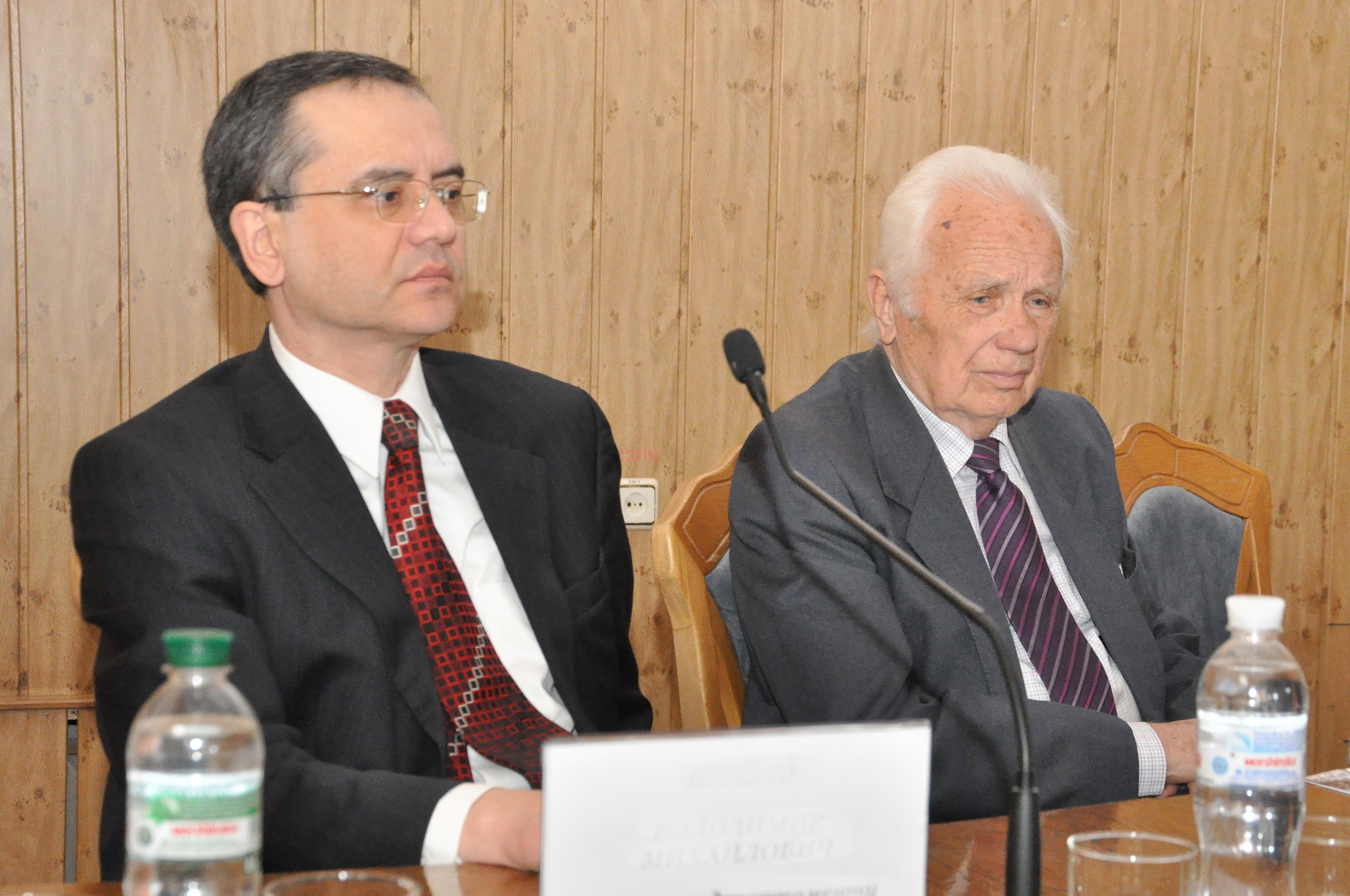 Українські вчені в га­лузі медицини, доктор медичних наук, професор, ректор Тернопільського державного медичного університету імені І. Я. Горбачевського Михайло Михайлович Корда і доктор медичних наук, професор, академік АН ВШ України, відмінник охорони здоров'я, заслужений працівник вищої школи УРСР, член-кореспондент Національної академії медичних наук України Іван Семенович Сміян.